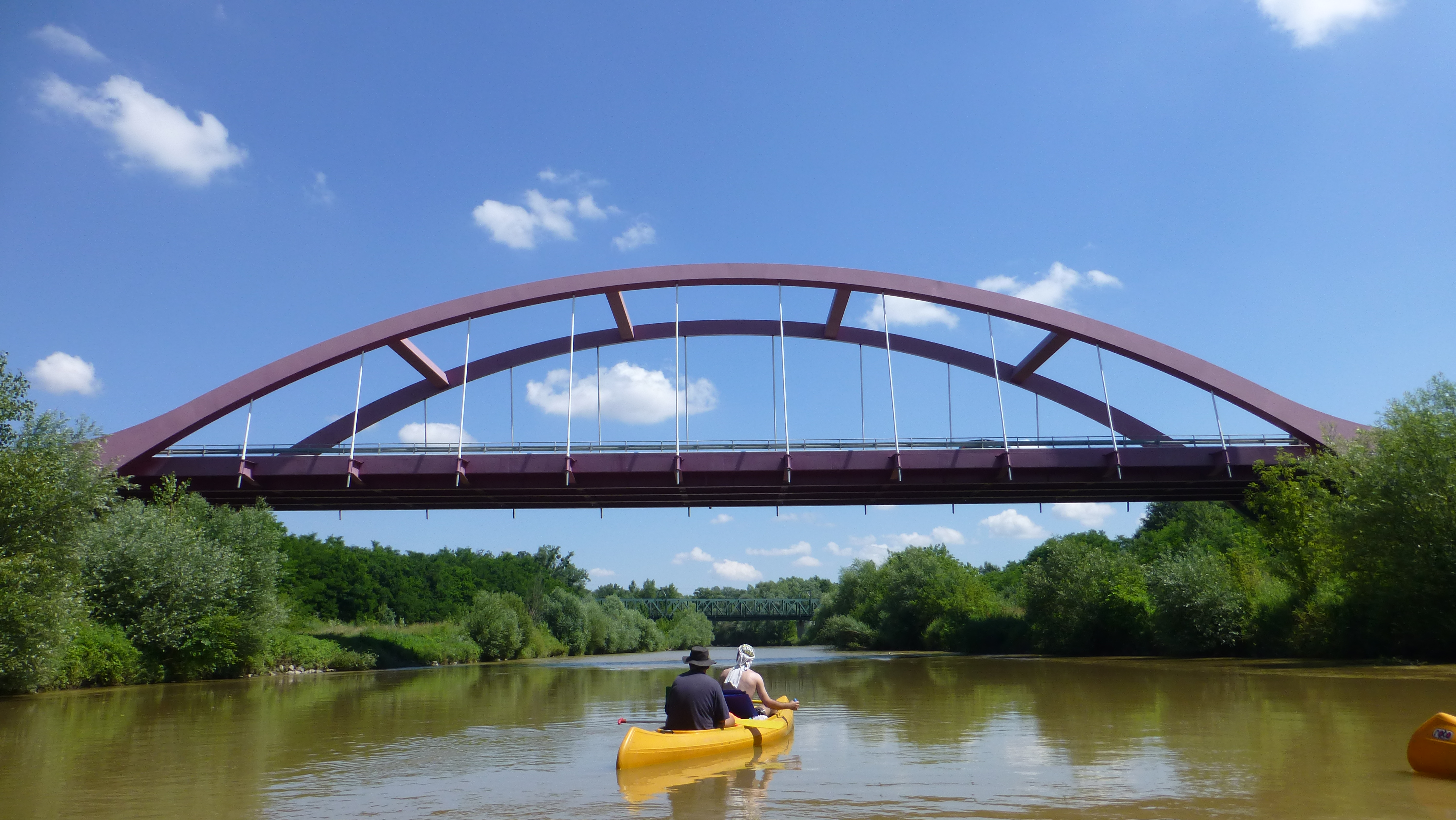 Sárvár, a 84-es főút Rába-hídja